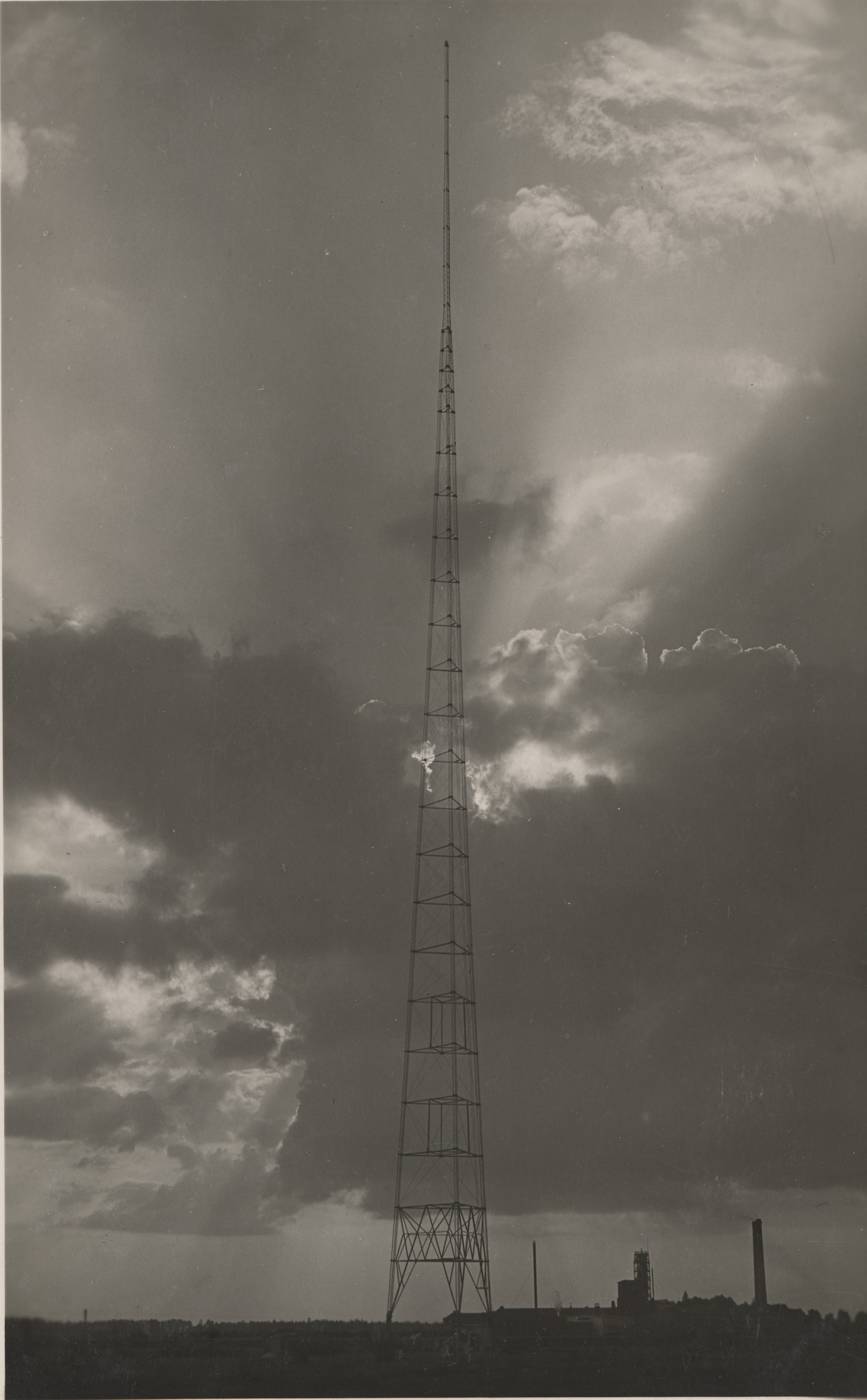 Türi saatejaam